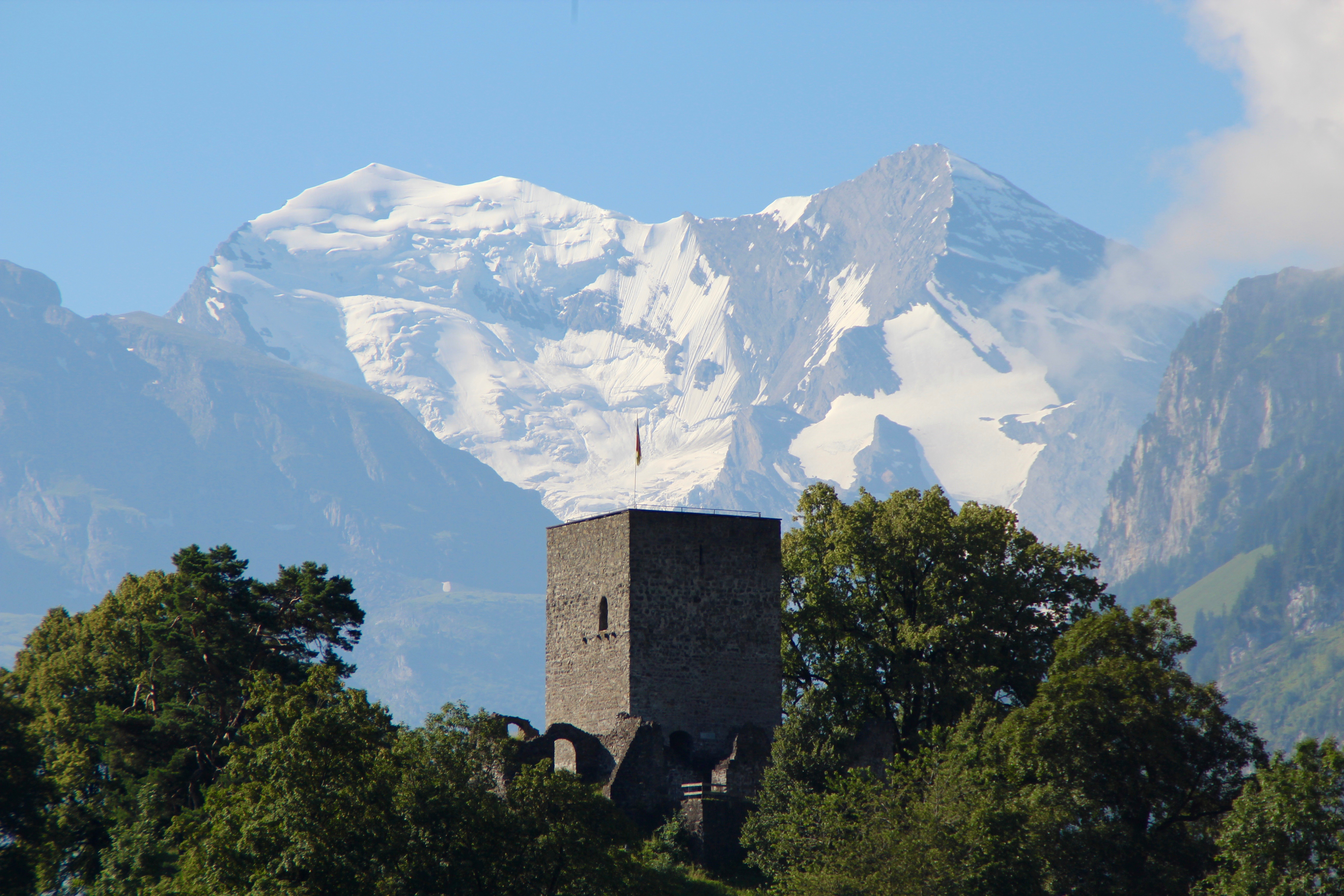 Tellenburg bei Frutigen; im Hintergrund Balmhorn (links) und Altels (rechts)